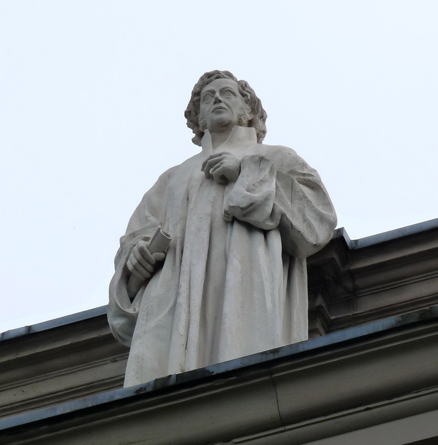 Friedrich Schleiermacher, statue sur la corniche du Palais universitaire de Strasbourg